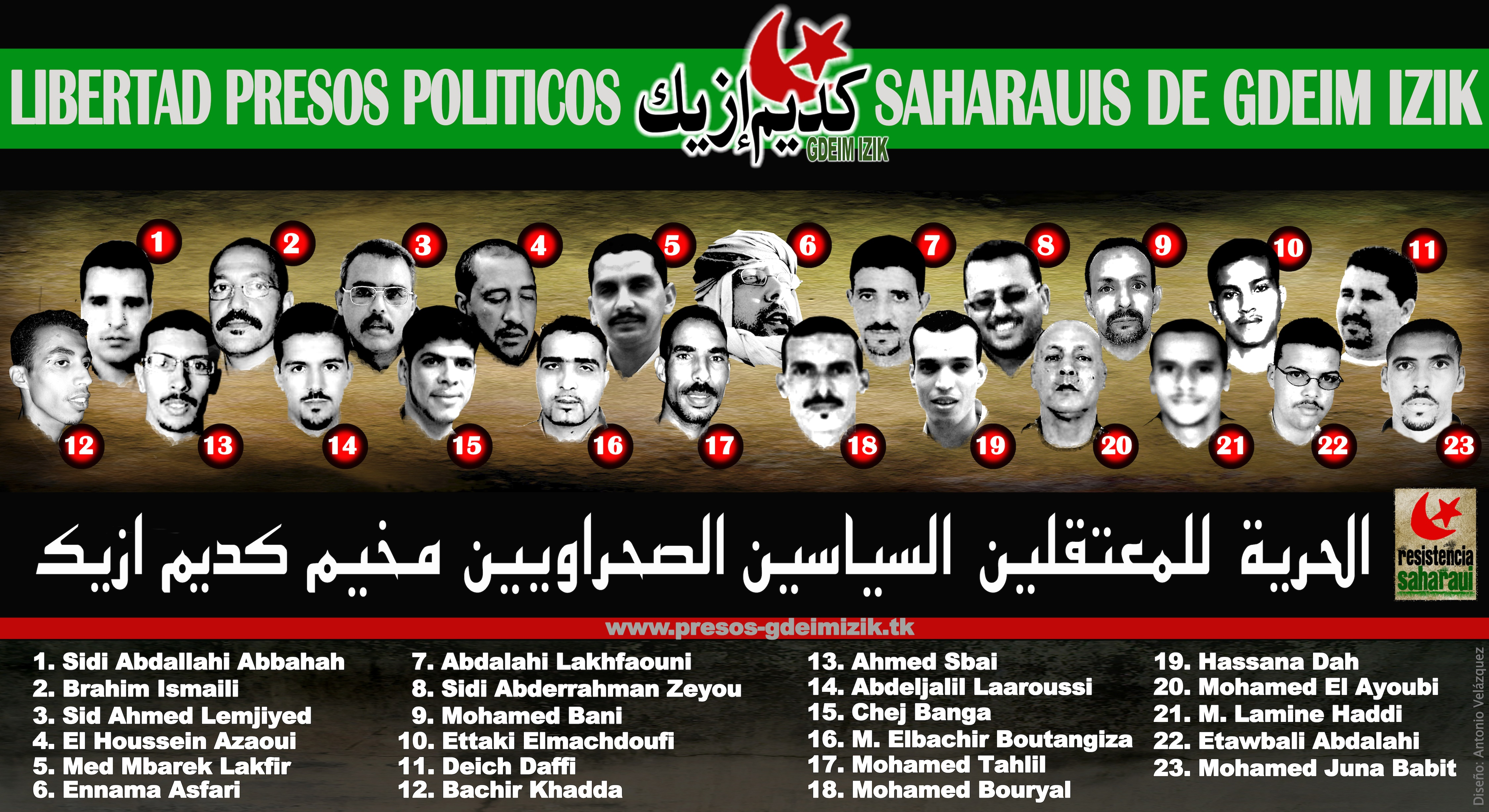 Presos saharauis en cárceles marroquíes